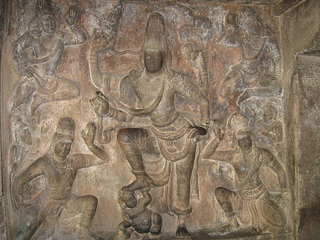 பல்லவர் காலக் குடைவரைக் கோயில்களில் காணப்படும் குடைவரைச் சிற்பம் ஒன்றின் அழகிய காட்சி.